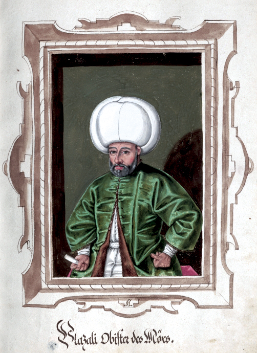 Cod. 8615, Fol. 22r: Johannes Lewenklau: Bilder türkischer Herrscher, Soldaten, Hofleute, Städte u. a.: Ali Kilic Pasha.